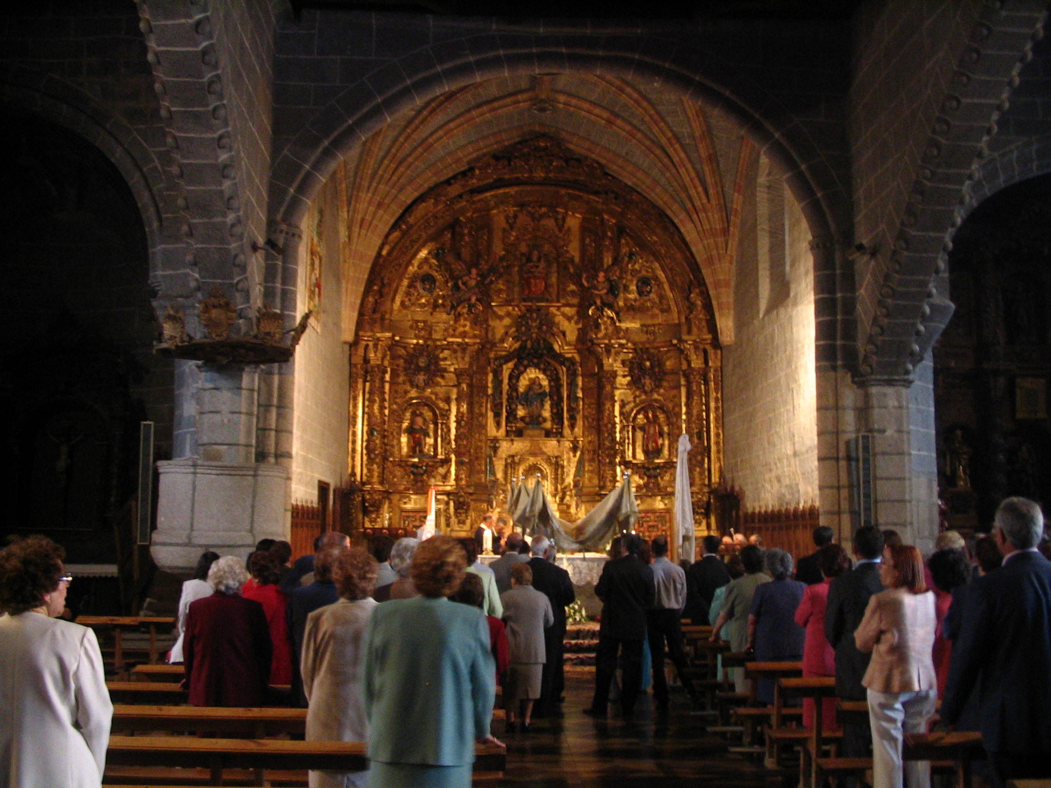 Interior de la Iglesia Parroquial de Ntra Sra del Castillo, Macotera. Final de la procesión del Corpus de 2005